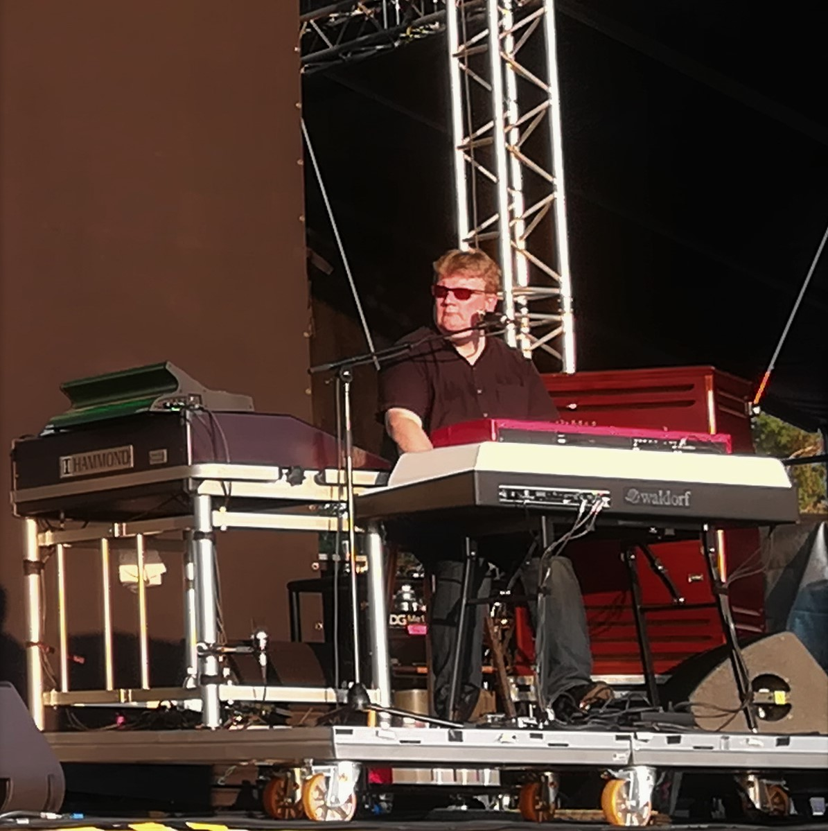 Pekka Gröhn kesällä 2019 J Karjalaisen keikalla.